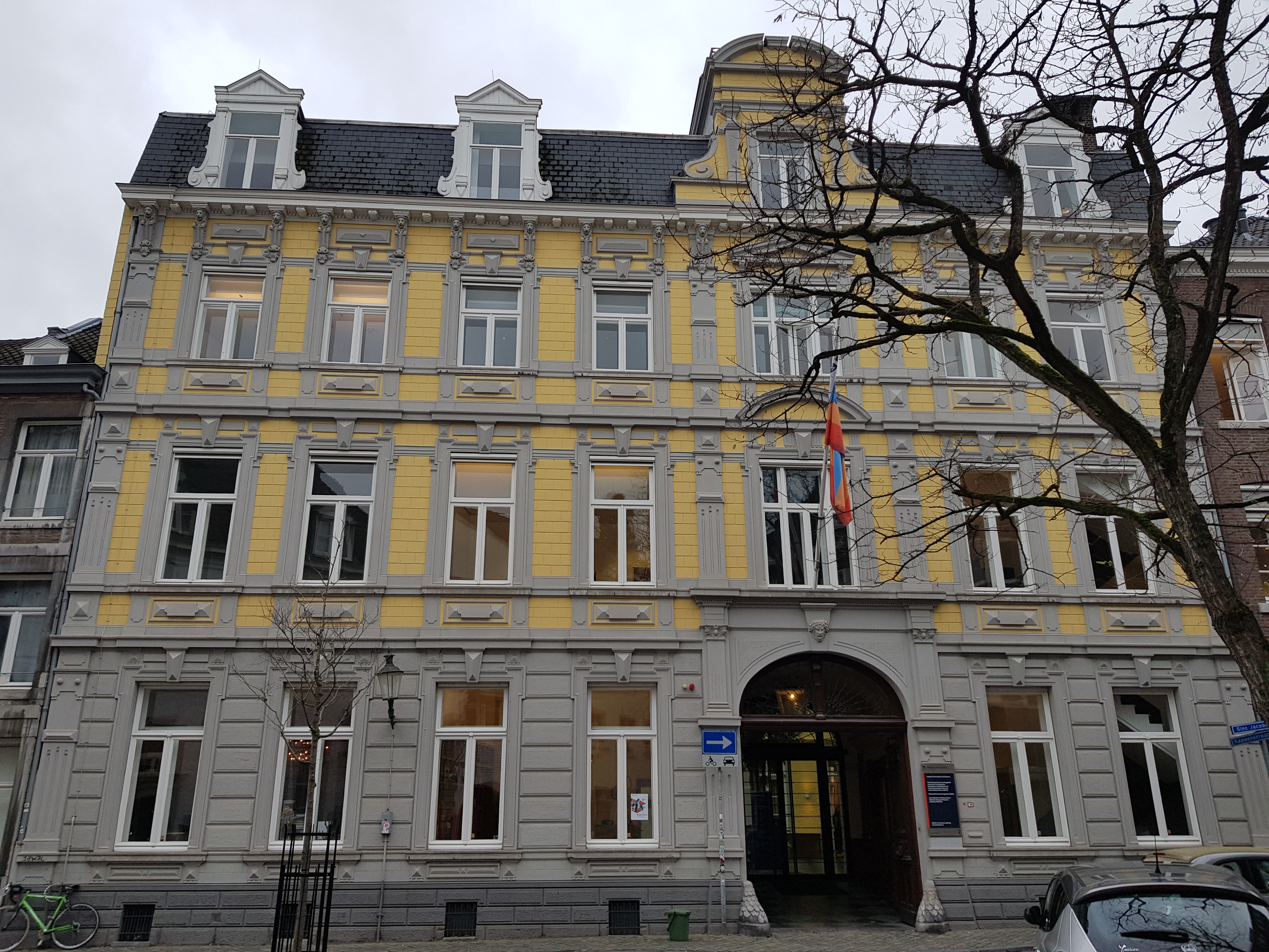 Herenhuis Hustinx, Maastricht, Nederland